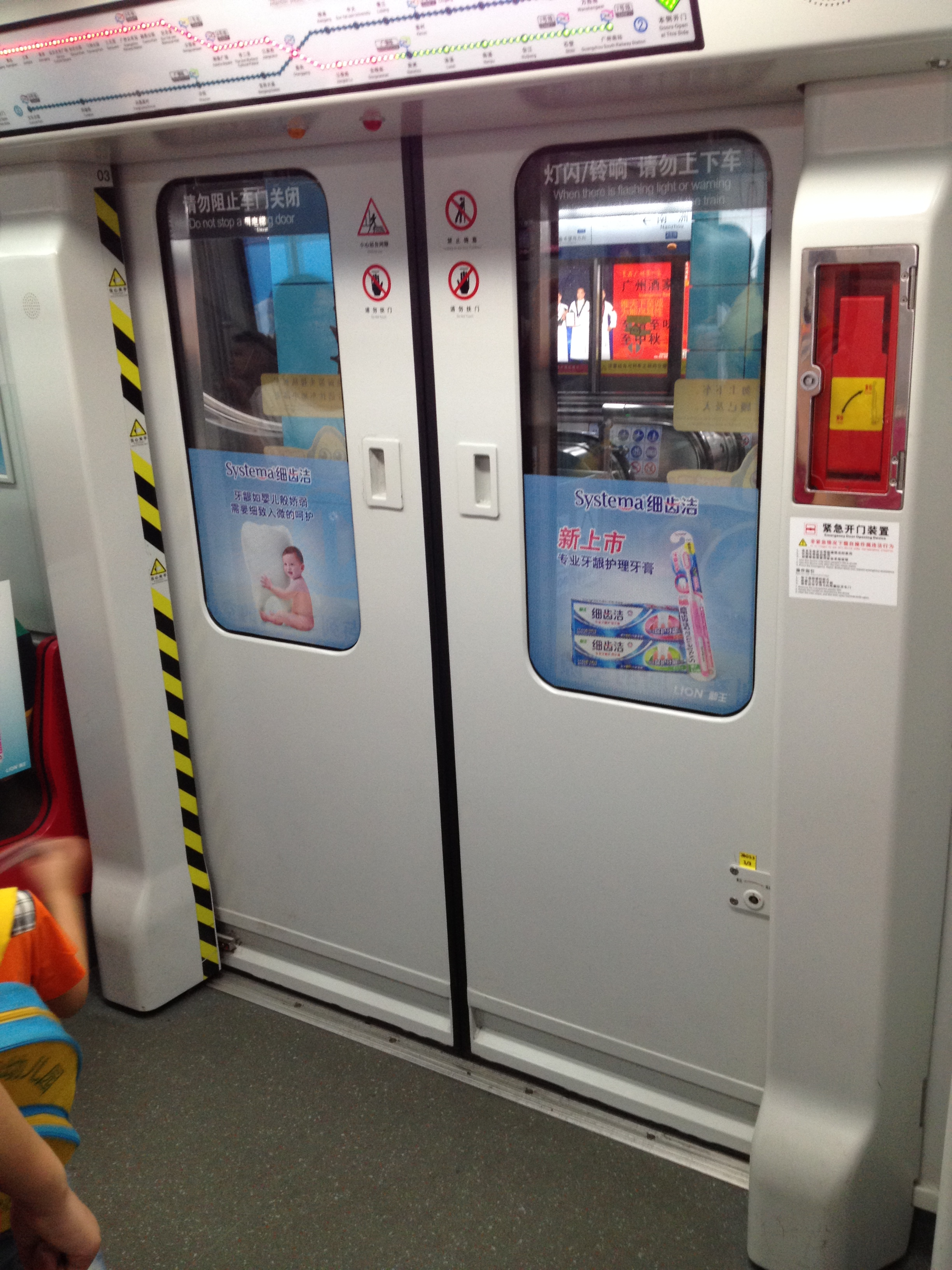 广州地铁A4型列车车门